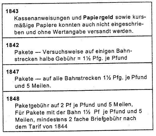 1844 Änderungen in den preußischen Tarifen